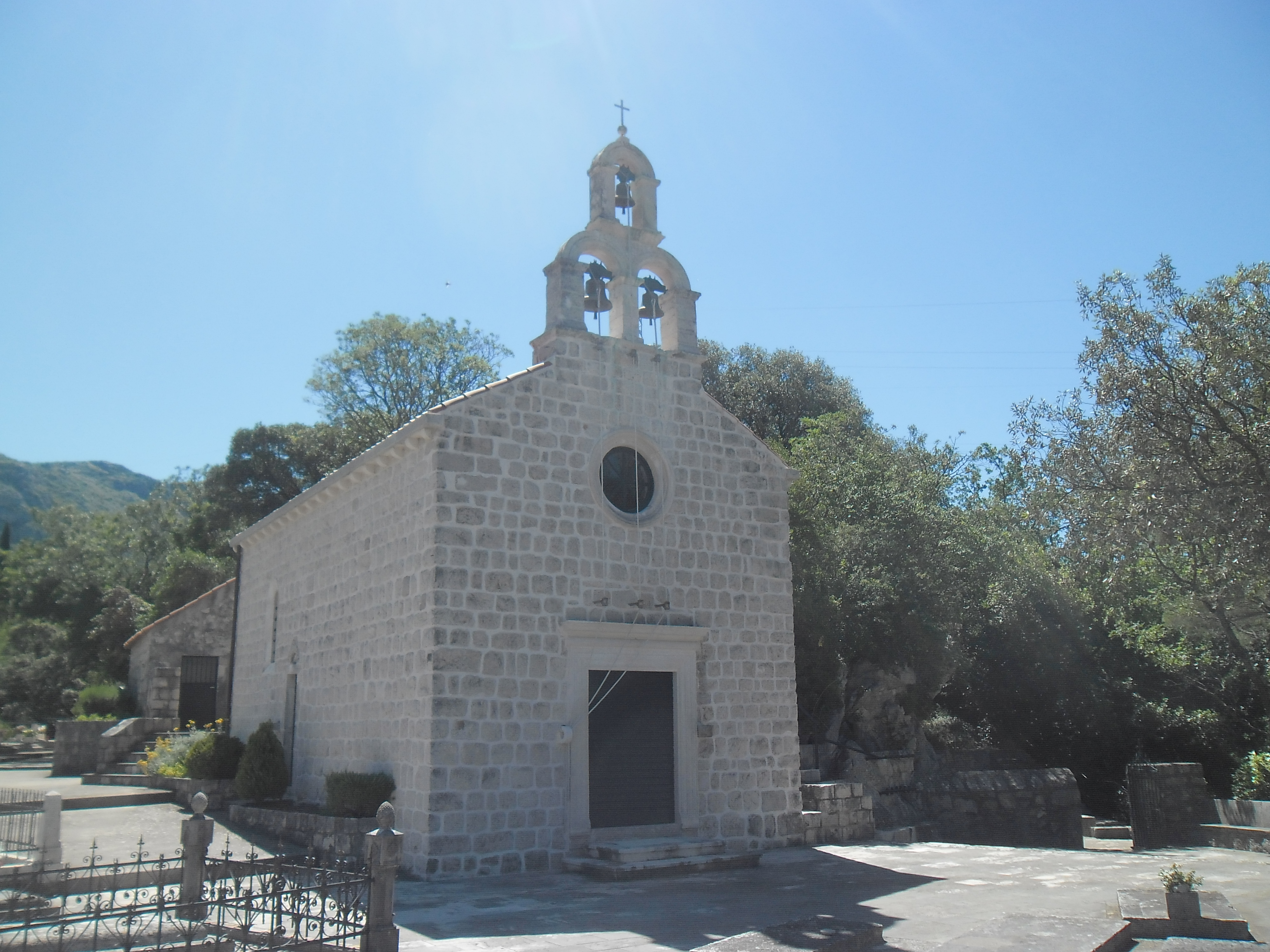 Crkva Svetog Duha u Komolcu